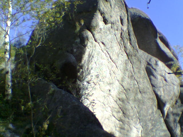 Falkenfelsen